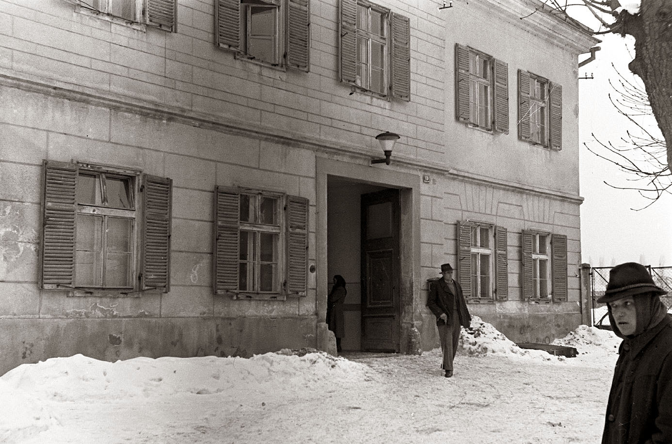 Vhod v mariborsko bolnišnico.